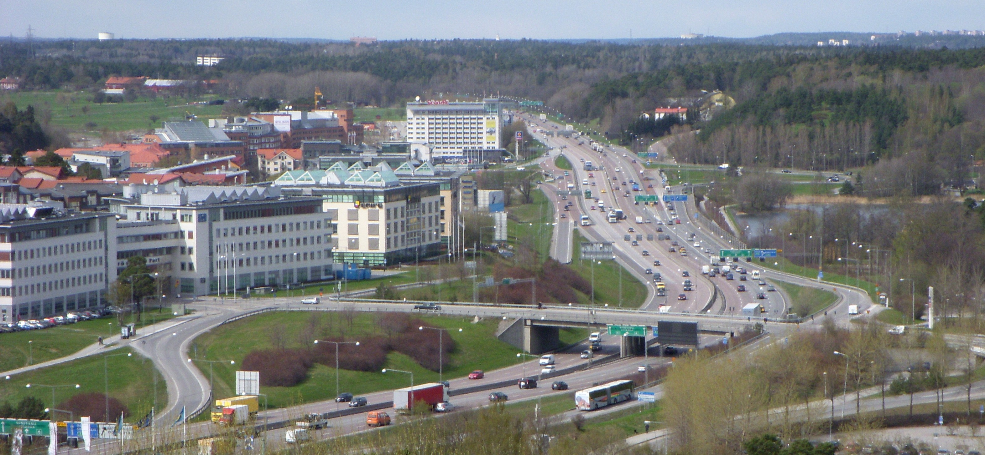 Uppsalavägen från Frösundatoppen mot norr